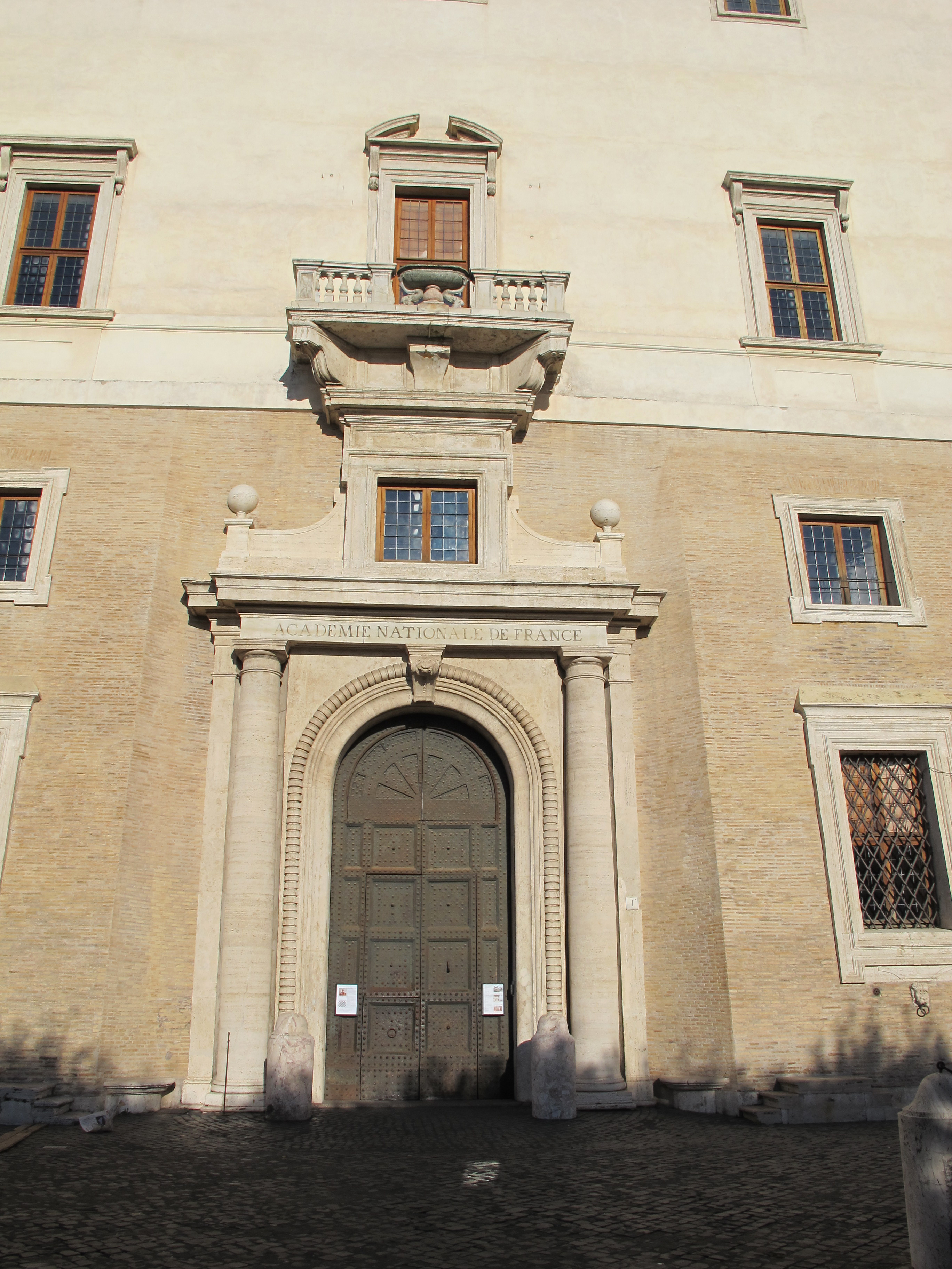 Villa Medici, Roma